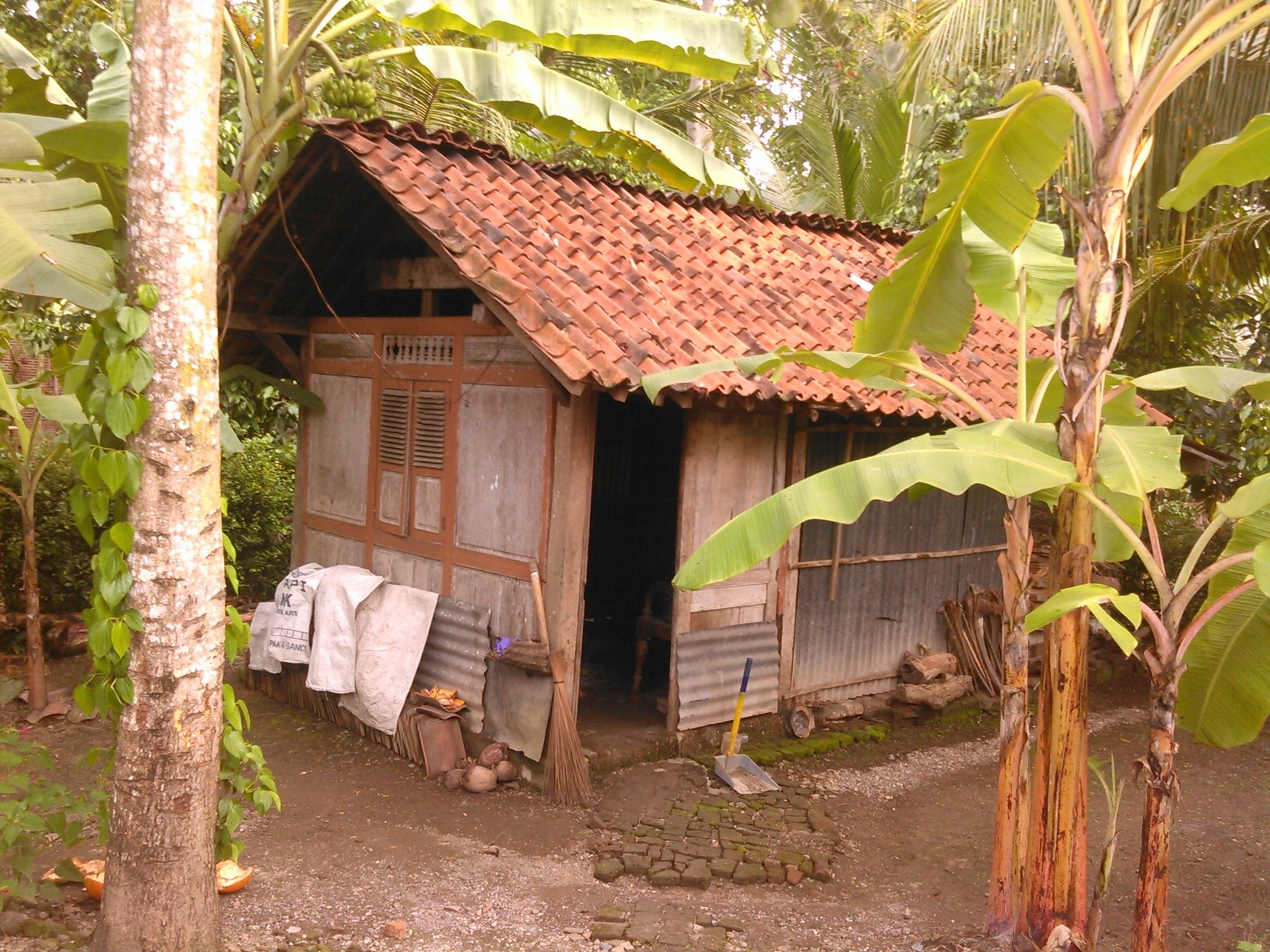 Salah satu sudut di Desa Karangtanjung, Alian, Kebumen, Jawa Tengah